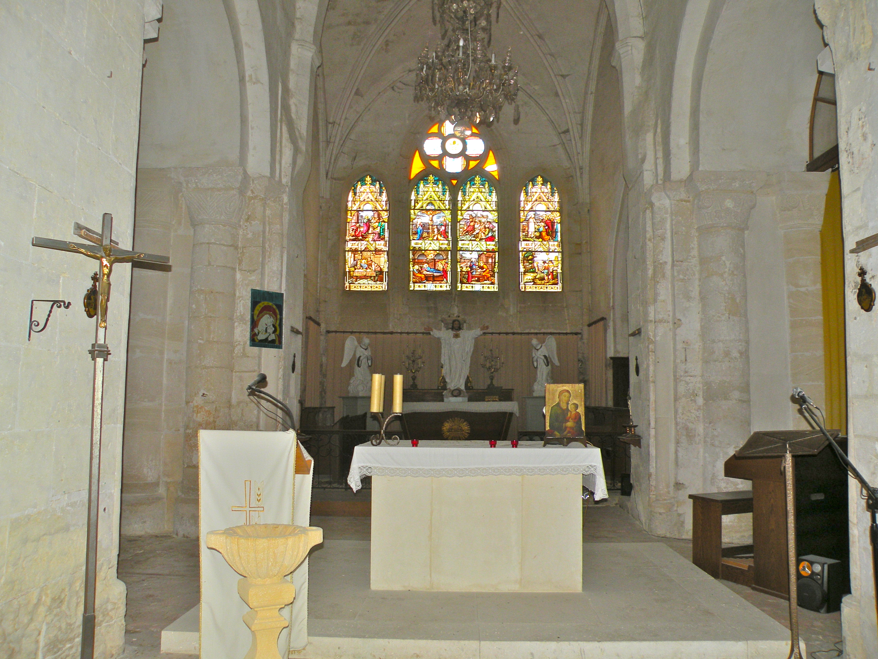 Intérieur de l'église Saint-Pierre-Saint-Paul d'Arronville